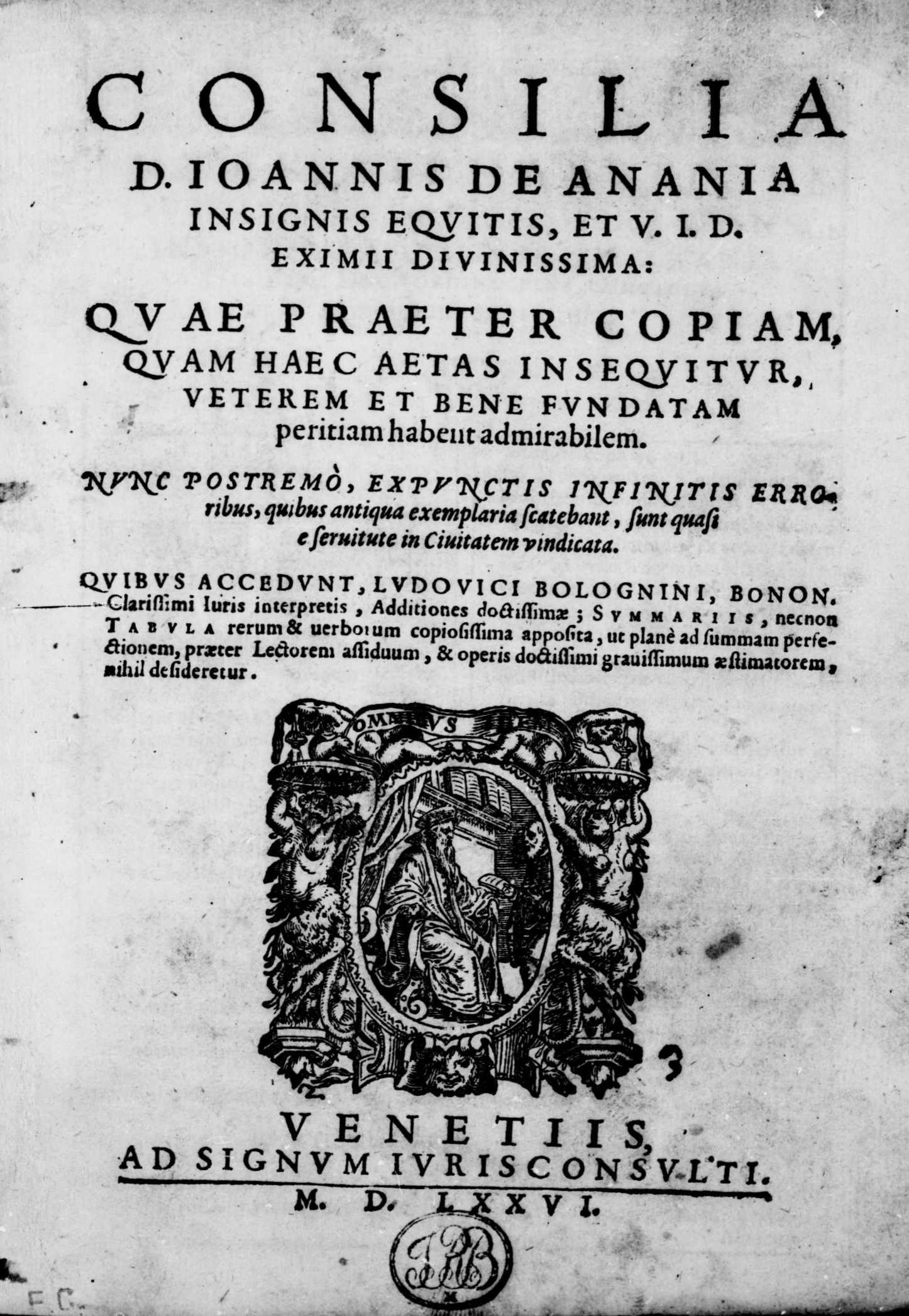 Frontespizio